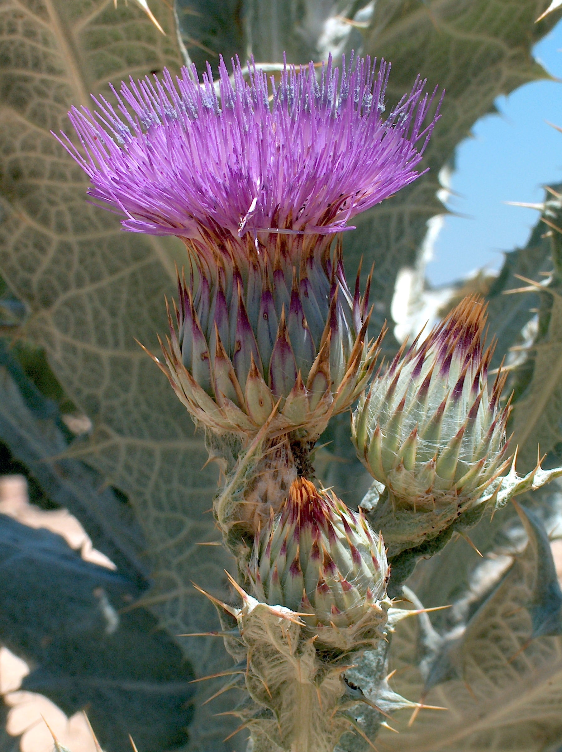 Onopordum nervosum (Cardo borriquero) : Capítulo en plena antesis y otros en preantesis - Los Estanques del Arroyo de Rejas, Madrid-Barajas (España).